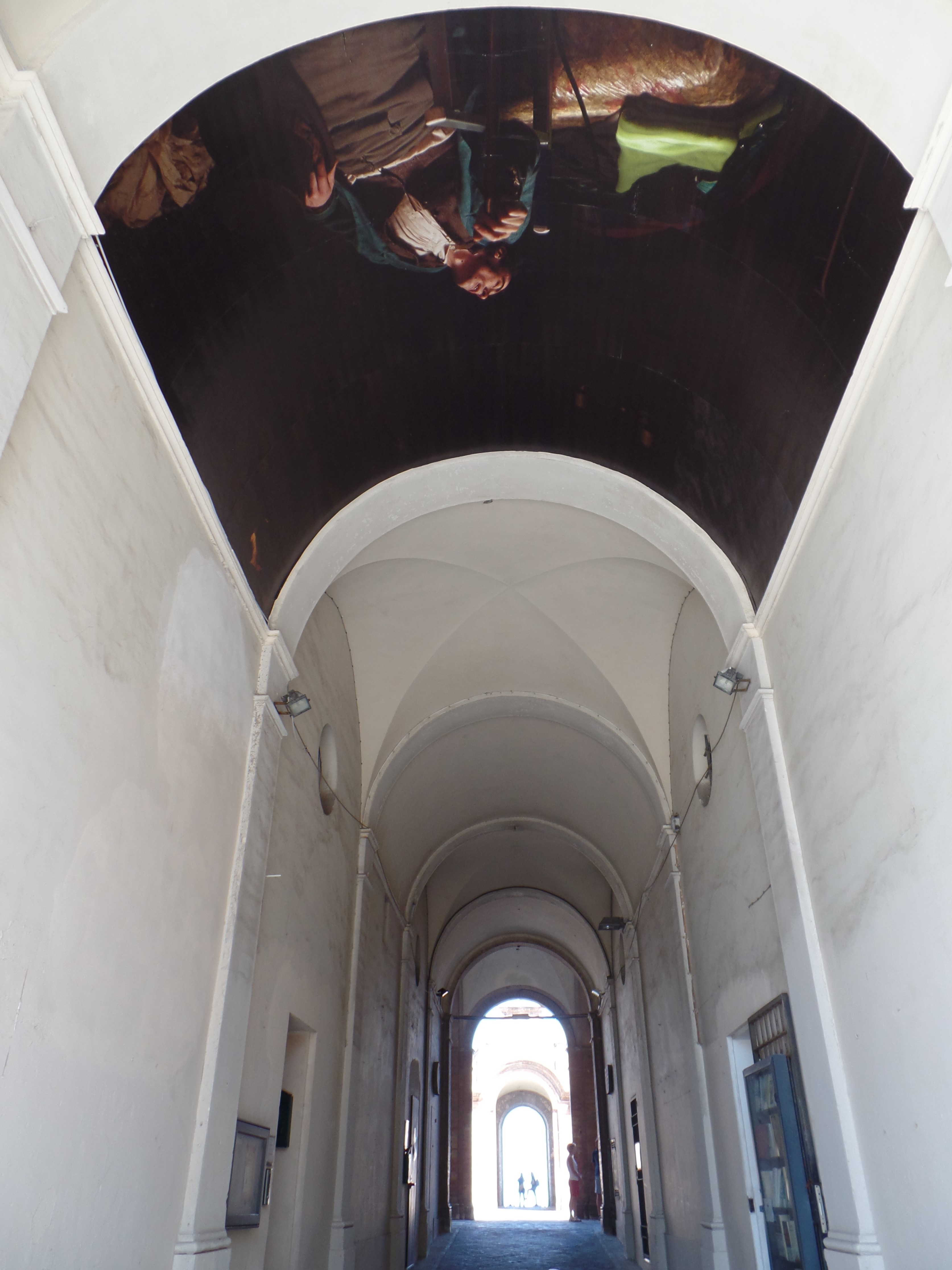 Recanati ingresso palazzo Venieri e immagine di Leopardi